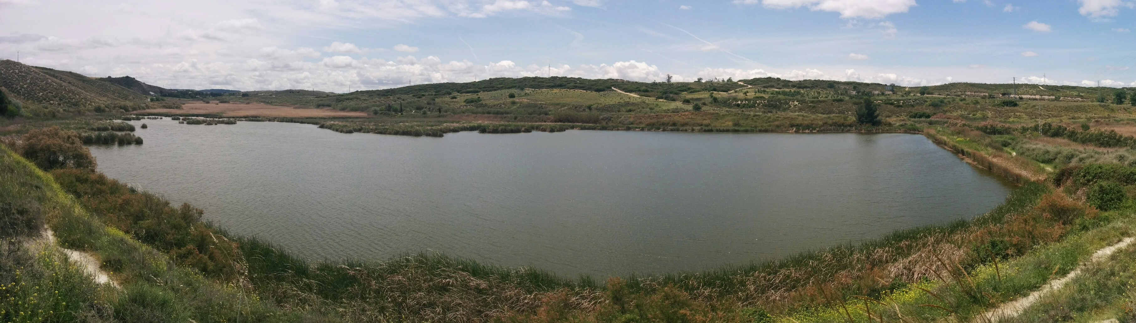 Mar de Ontígola. LIC Vegas, cuestas y páramos del sureste de Madrid. This is a photography of a Special Area of Conservation in Spain with the ID: ES3110006. Natura2000 entry, EEA entry